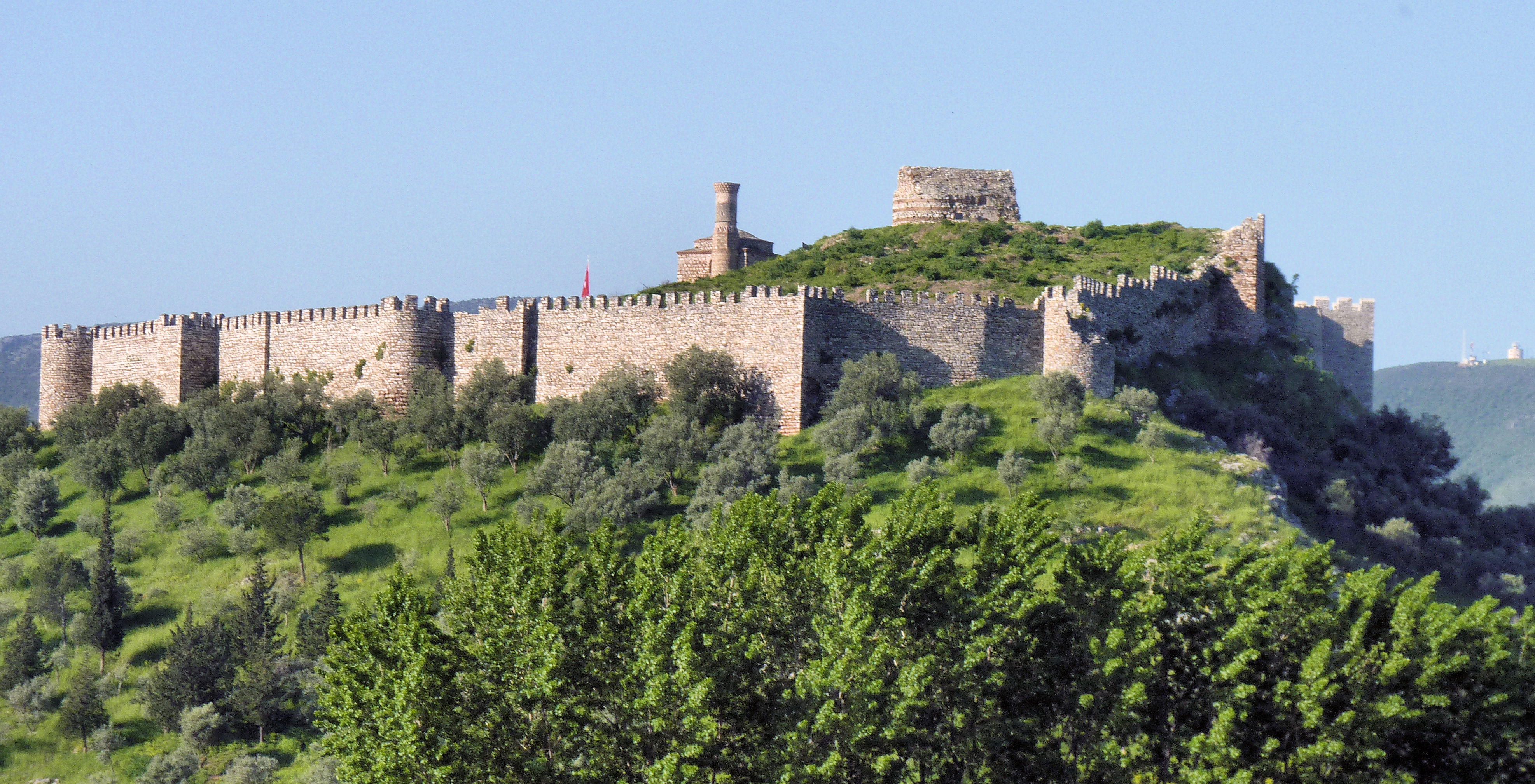 Efeso - Fortezza